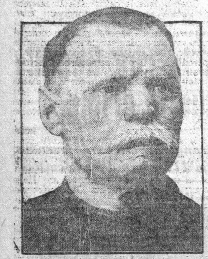 Aimable Delarue, patron du canot de sauvetage Amiral Roussin à l'Île-Molène jusqu'en 1938, sauveteur "le plus décoré de France" (Journal "Le Petit Parisien" n° 12783 du 29 octobre 1911